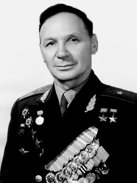 Владимир Константинович Коккинаки (1904 — 1985) — советский лётчик-испытатель, генерал-майор авиации